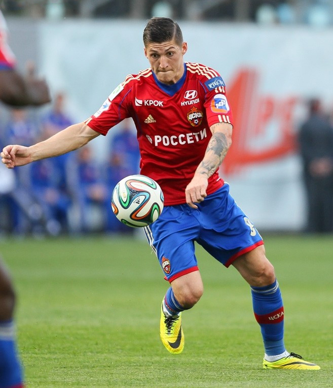 ЦСКА - Локомотив